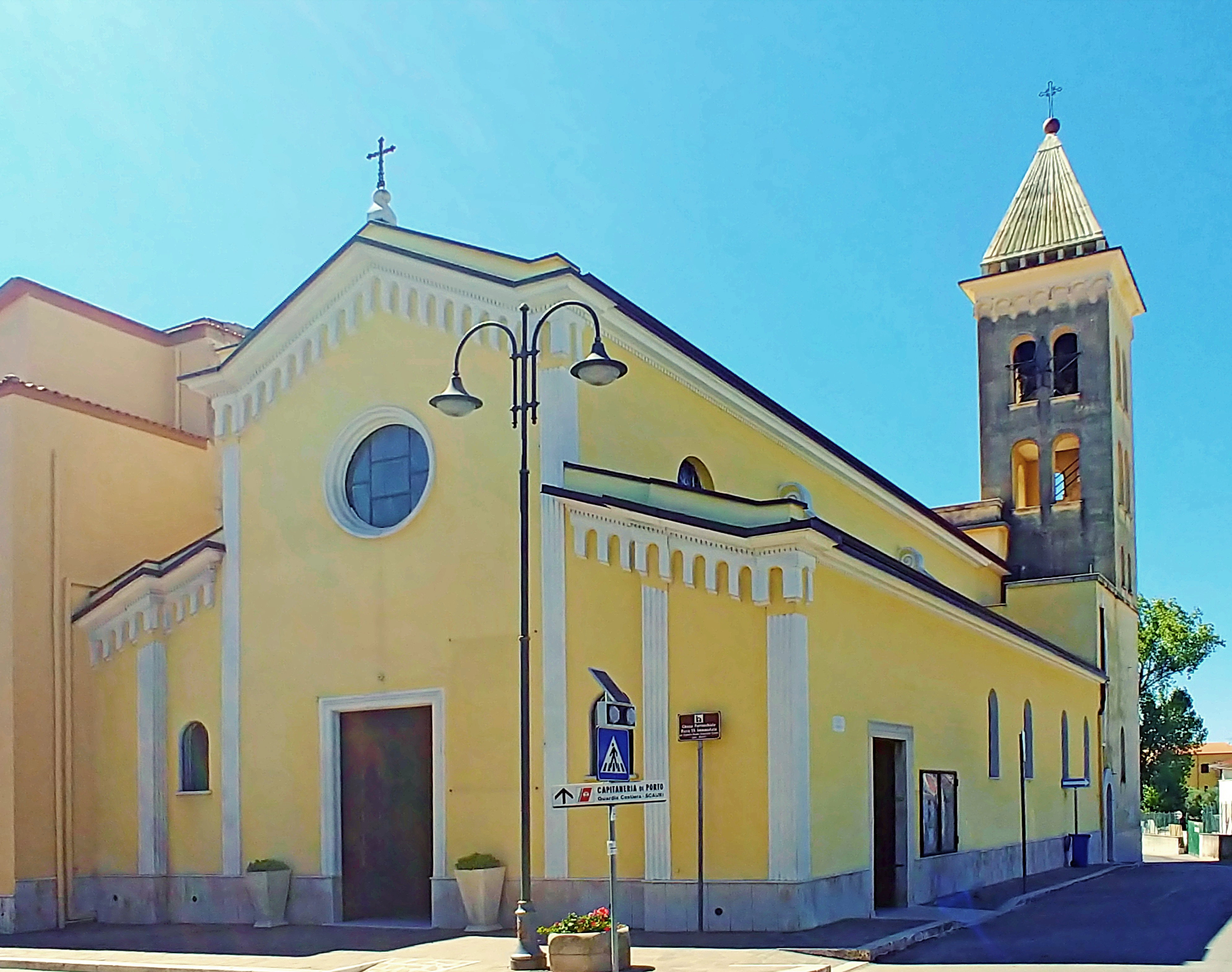 Esterno.